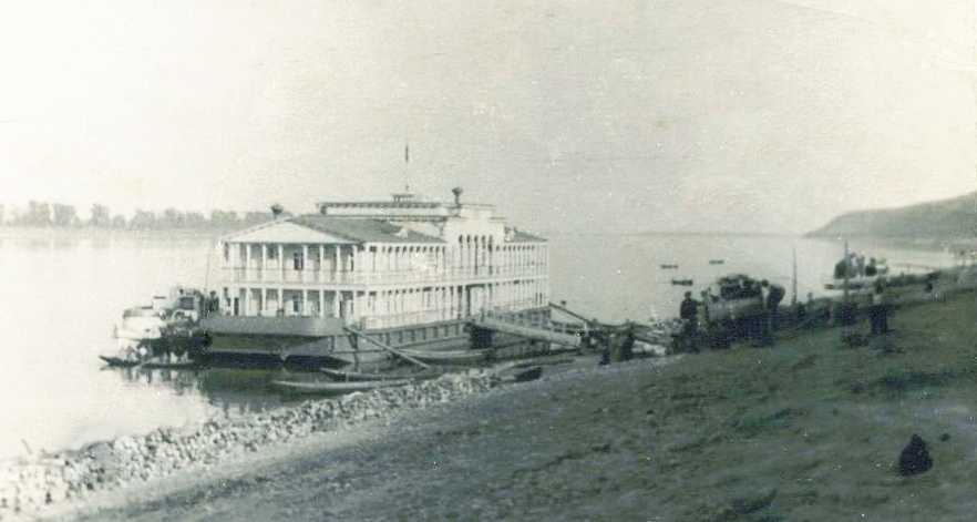 Берег Волги и пристань в селе Новодевичье Шигонского района Самарской области 1950 год - до затопления Куйбышевским водохранилищем. Фотография имеет историческую ценность. Оригинал хранится в библиотеке Новодевиченского Дома культуры